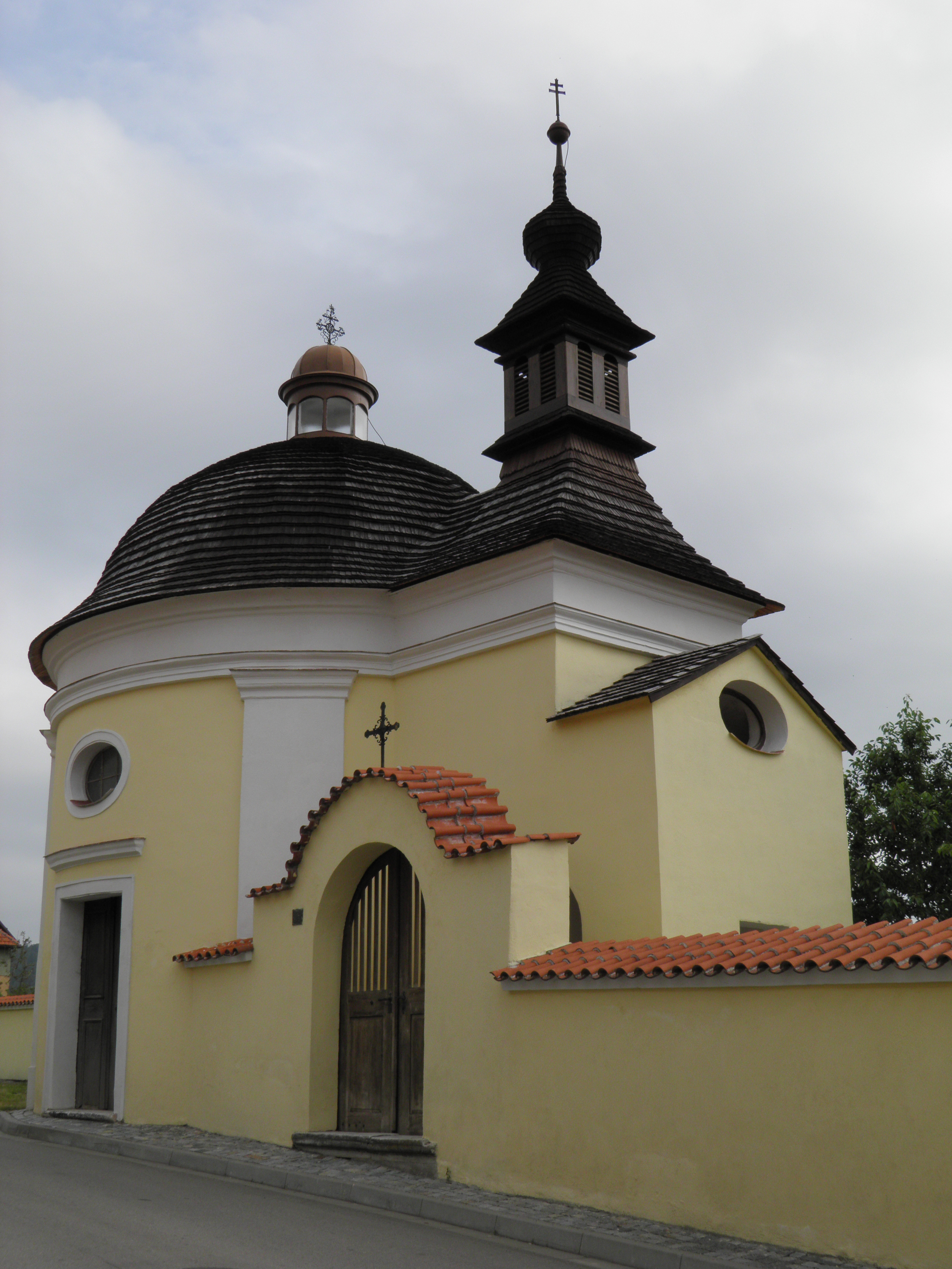 Kaple sv. Antonína Paduánského v Lomnici.